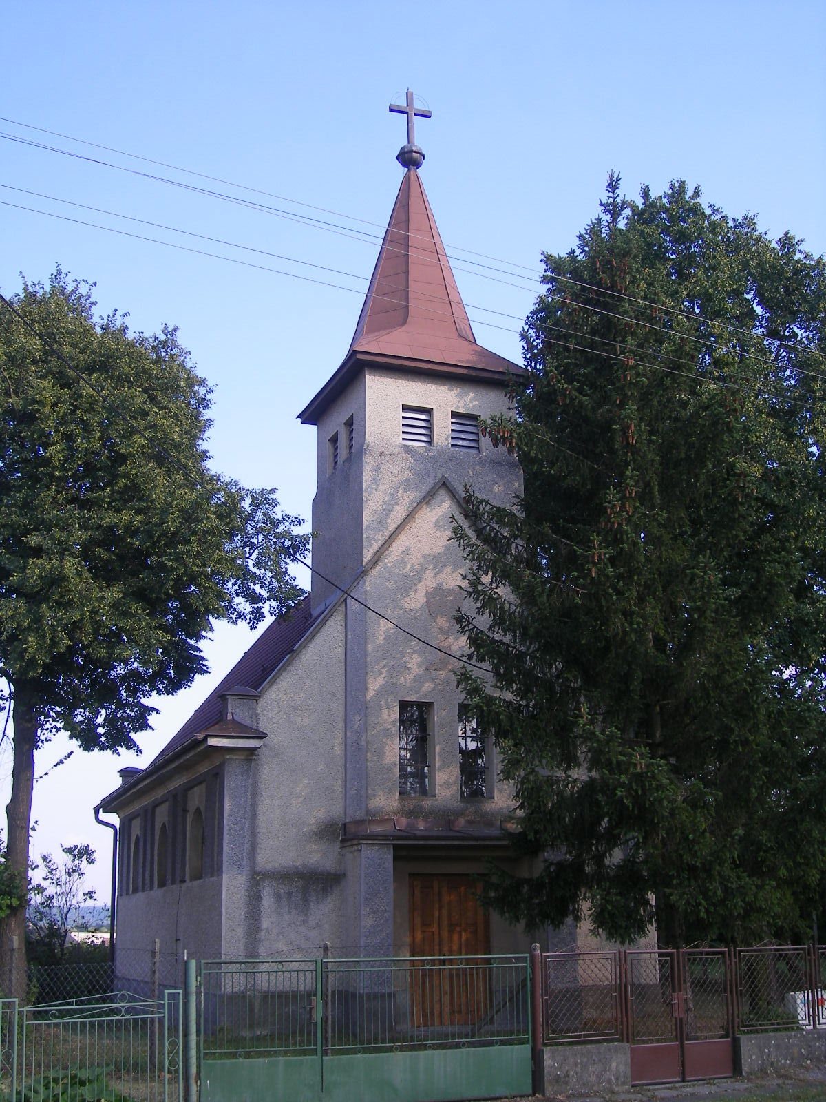 Nagycsalomja - evangélikus templom